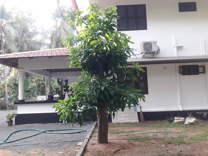 മരങ്ങളിലെ പുനർ യൗവന പ്രക്രിയയ്ക്ക് ശേഷം ഇലകൾ വന്ന ഒരു മാവ്